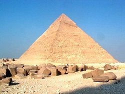 Chefrenpyramide 2004